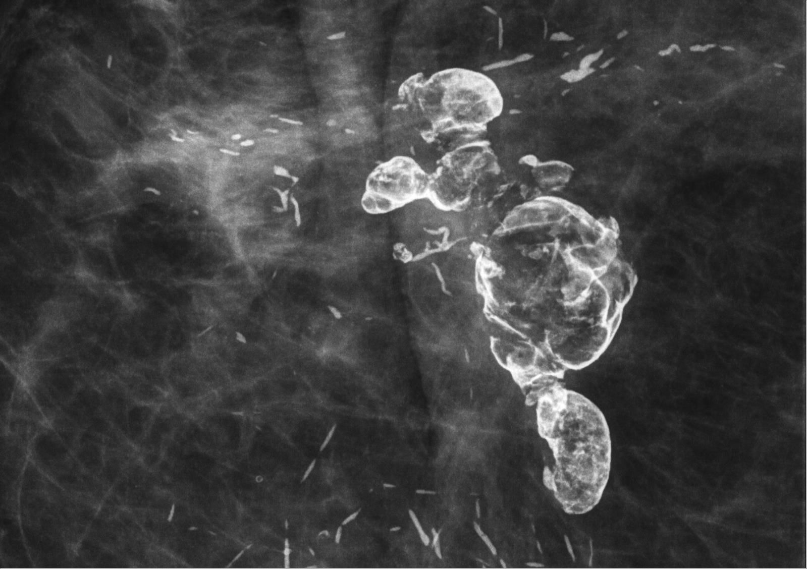 Liponekrosen nach Operation und Plasmazellmastitis mit typisch lanzettförmigen Verkalkungen in der Mammographie einer alten Frau.